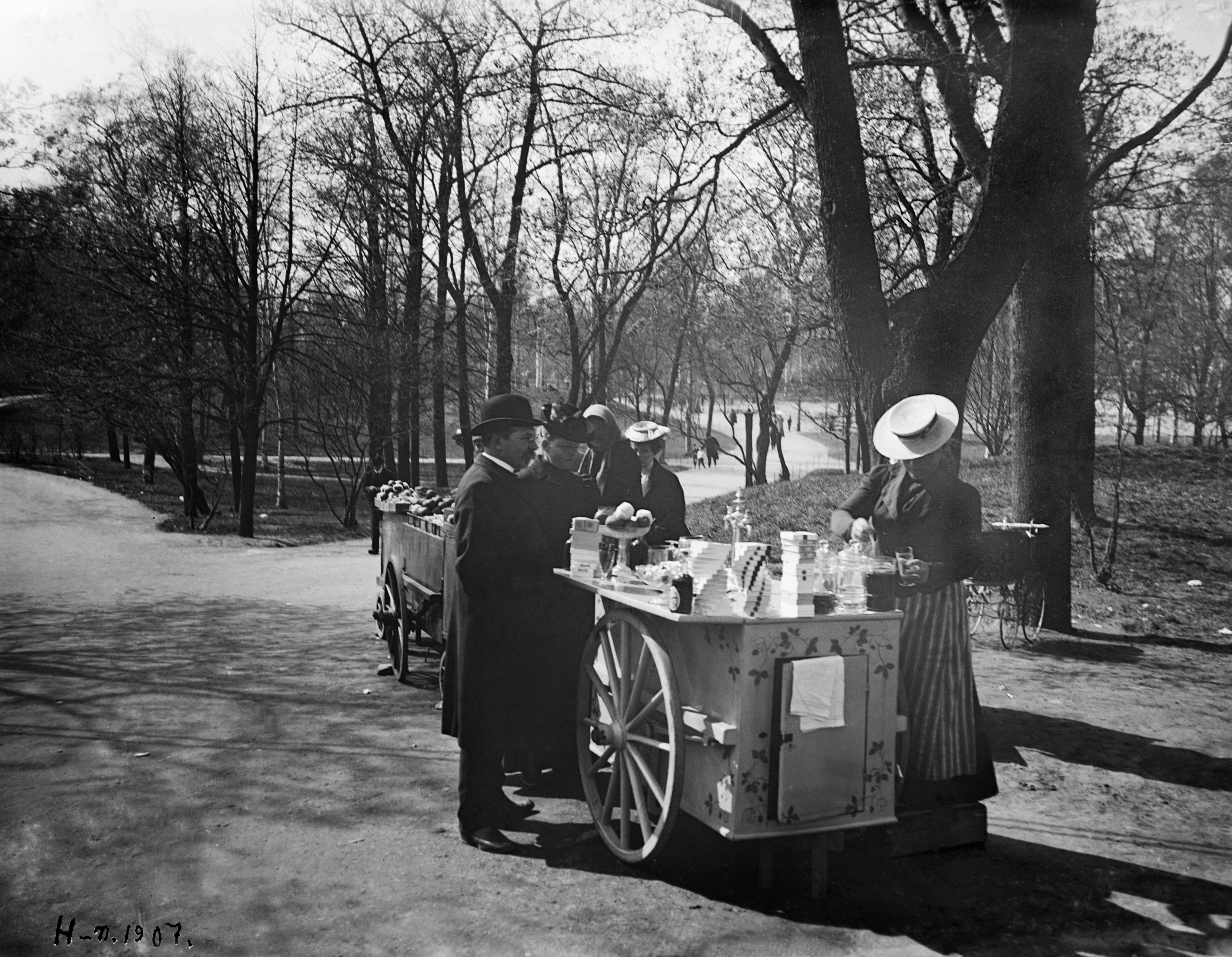 Virvokkeiden myyntikärryt Kaisaniemessä, keskellä professori Gustaf Nyström ja Signe Brander. -- negatiivi ja vedos, paperi pahvi, mv